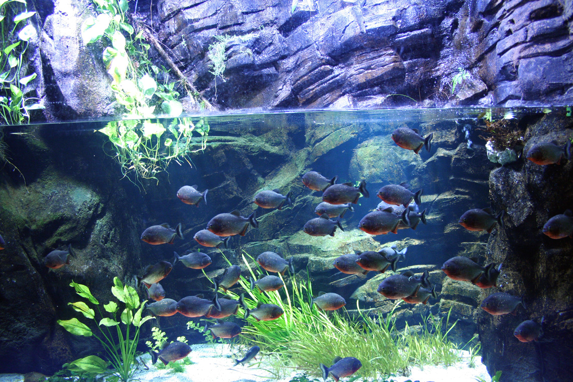 Bassin de Pygocentrus nattereri (piranha à ventre rouge) à l'aquarium de guadeloupe